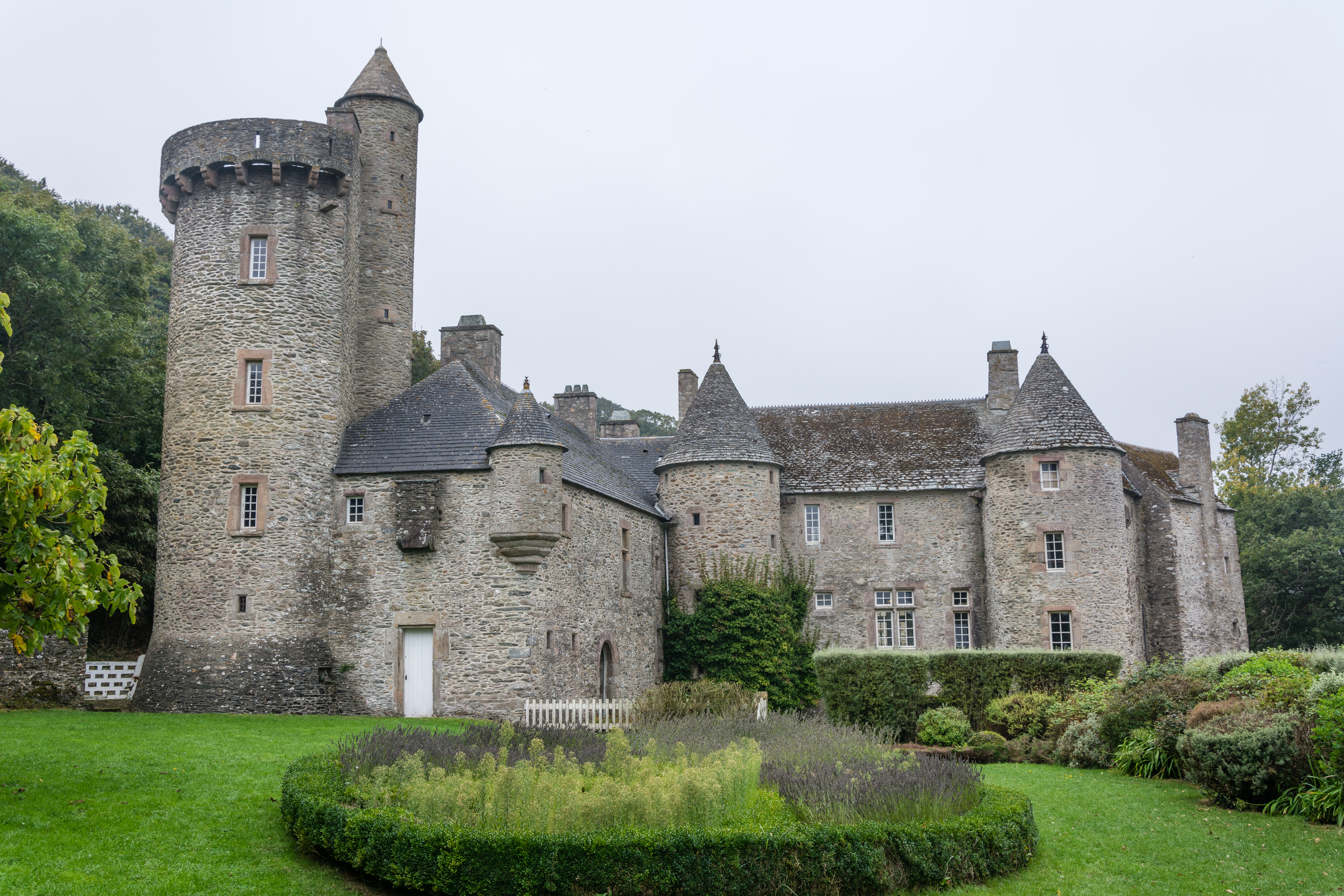 Manoir de Dur-Écu, commune d'Urville-Nacqueville (50).